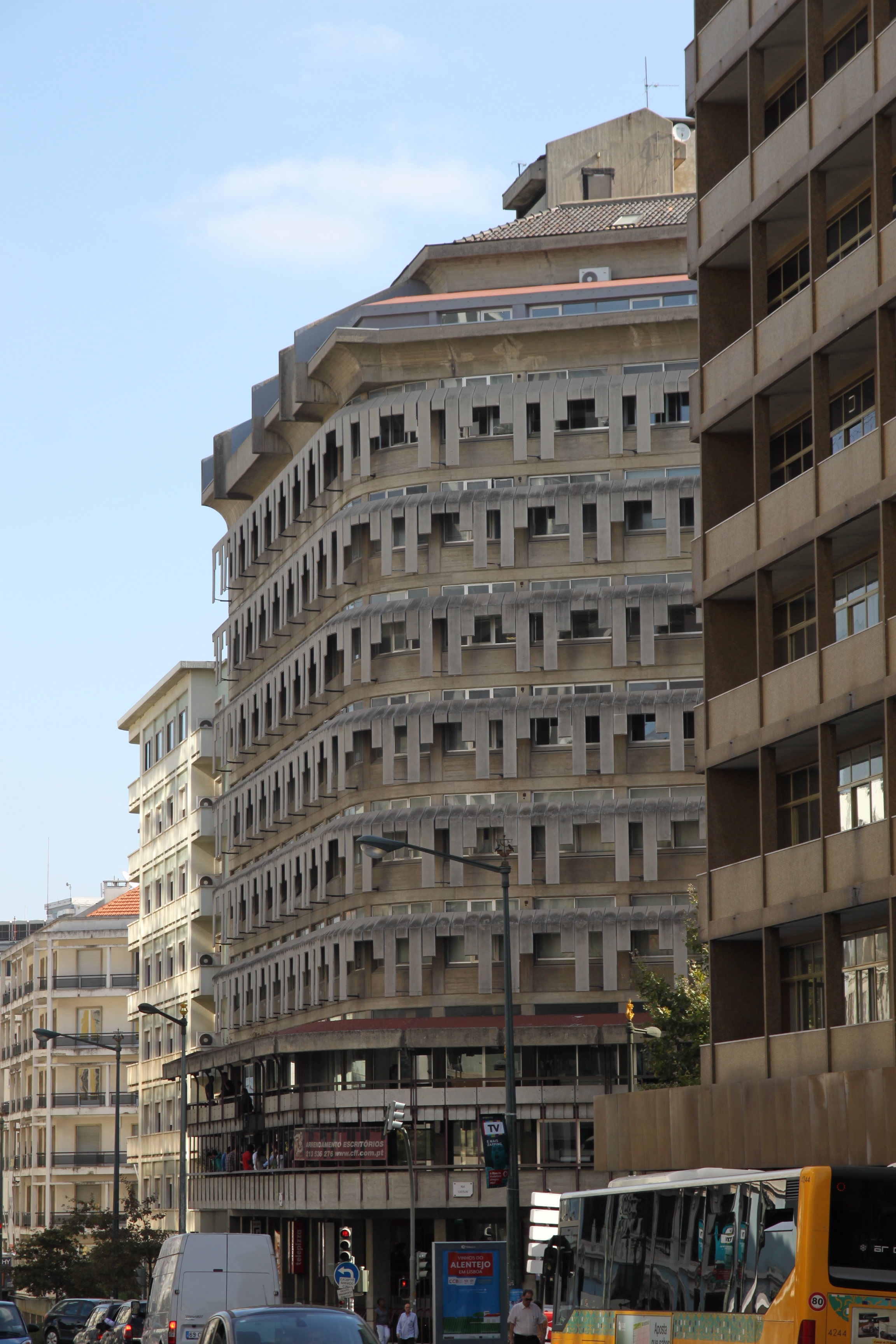 Conjunto: do edifício Castil, edifício Franjinhas e fachada do edifício na Rua Braamcamp; Arquitetura Nuno Teotónio Pereira This file was uploaded for Wiki Loves Monuments in Portugal with the unique identifier 70773. This monument is classified as Monumento de Interesse Público. This building is classified as Monumento de Interesse Público.